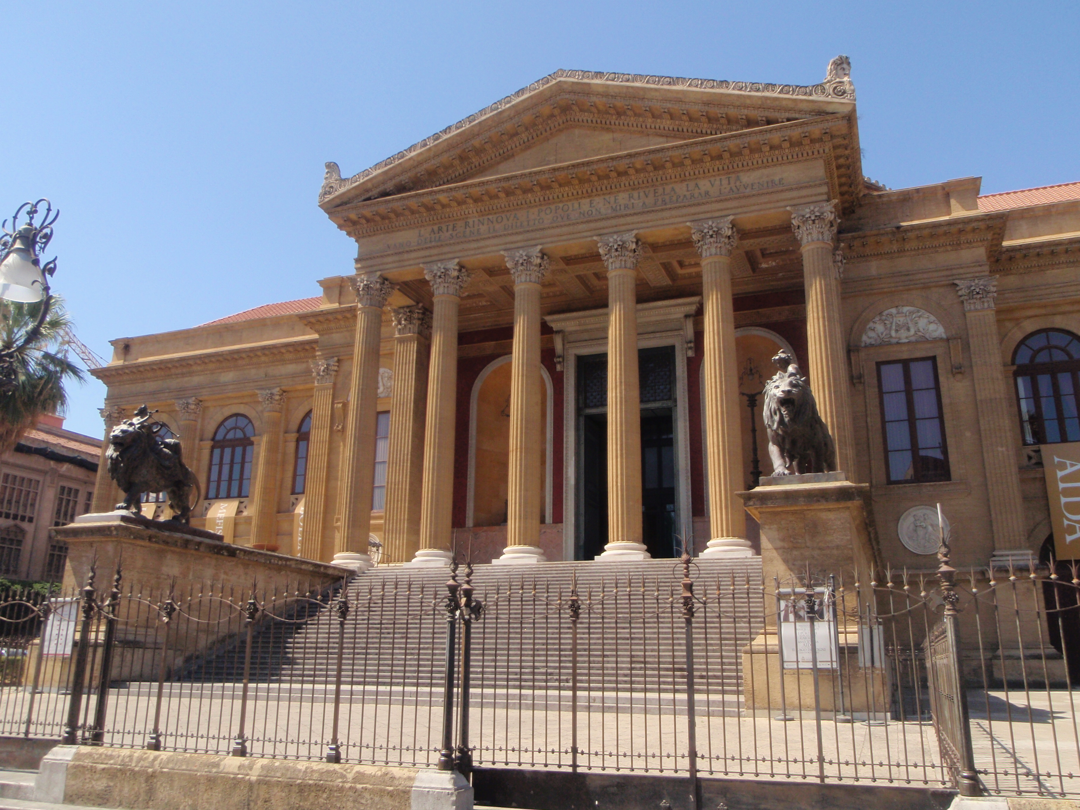 Palermo, Opernhaus